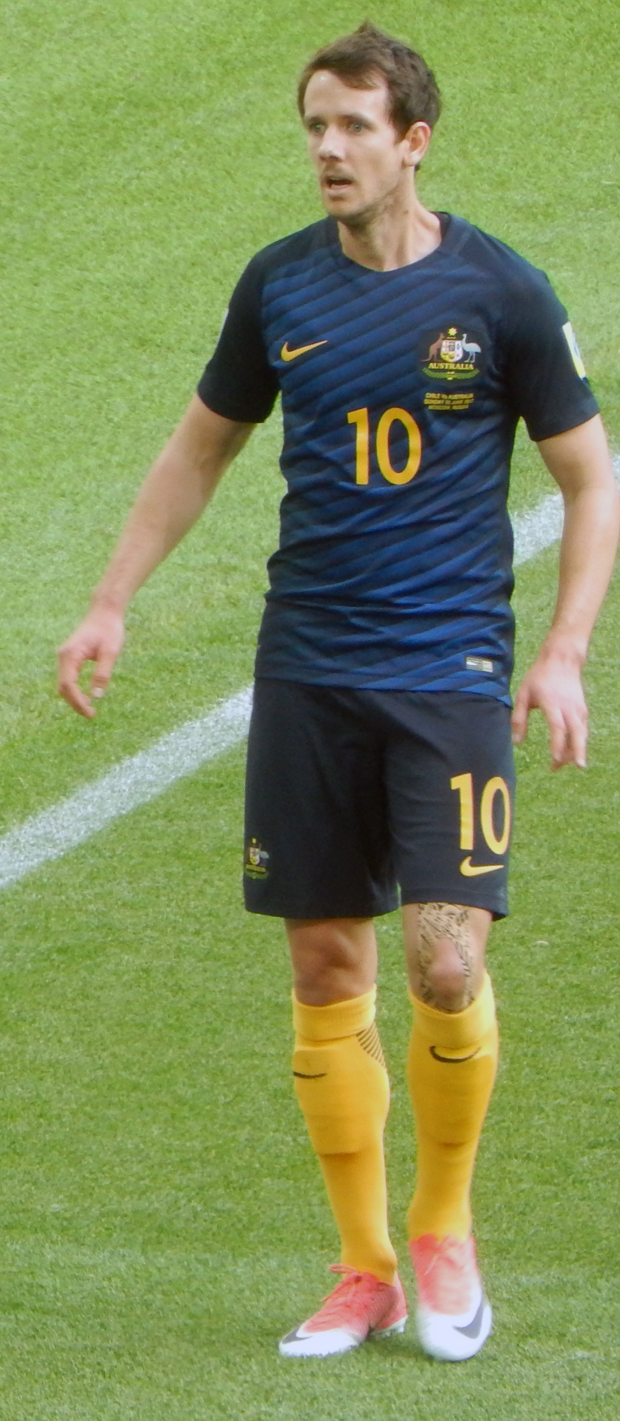 Матч Чили – Австралия